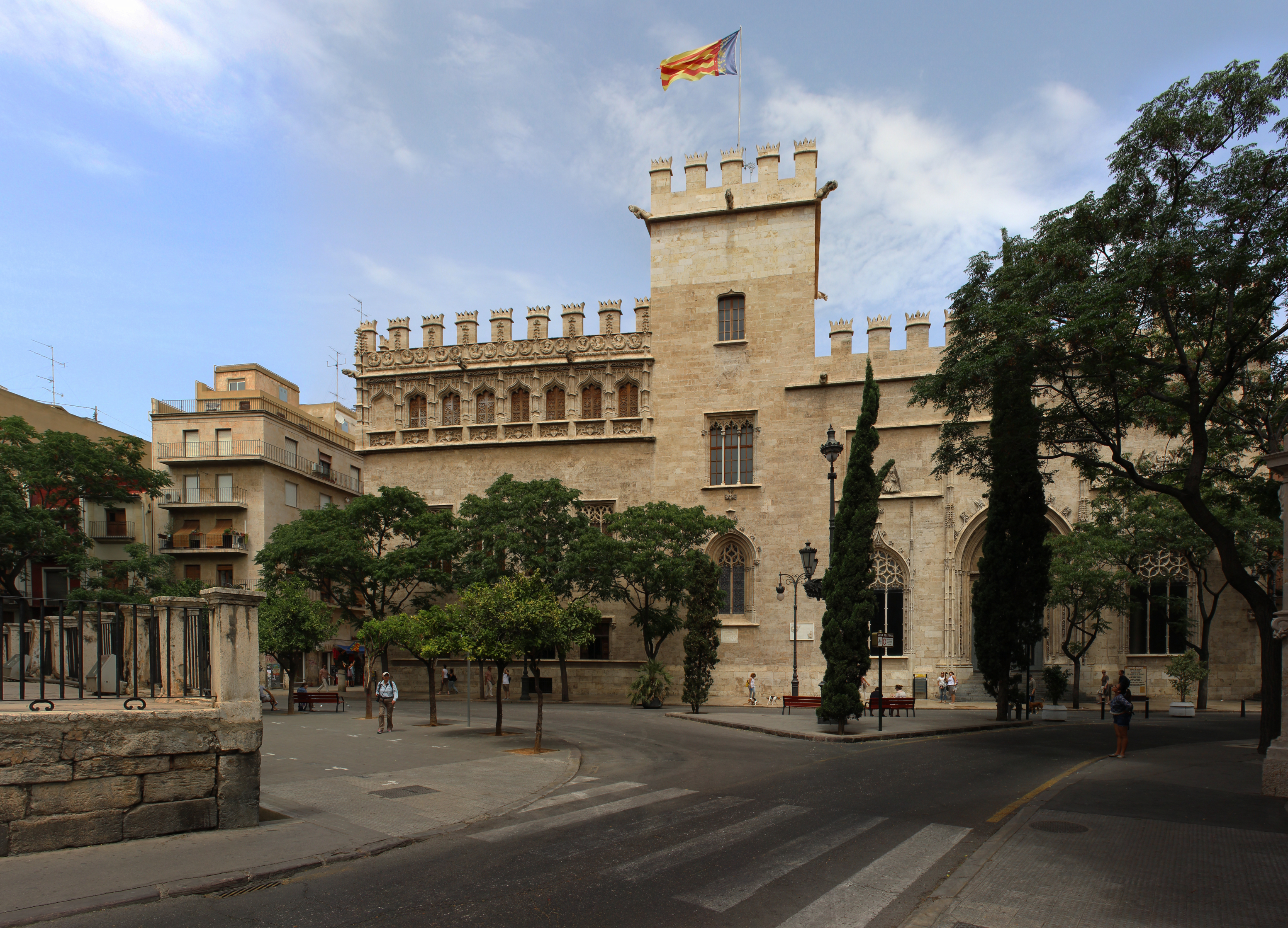 Fachada principal de la Lonja de la Seda en Valencia